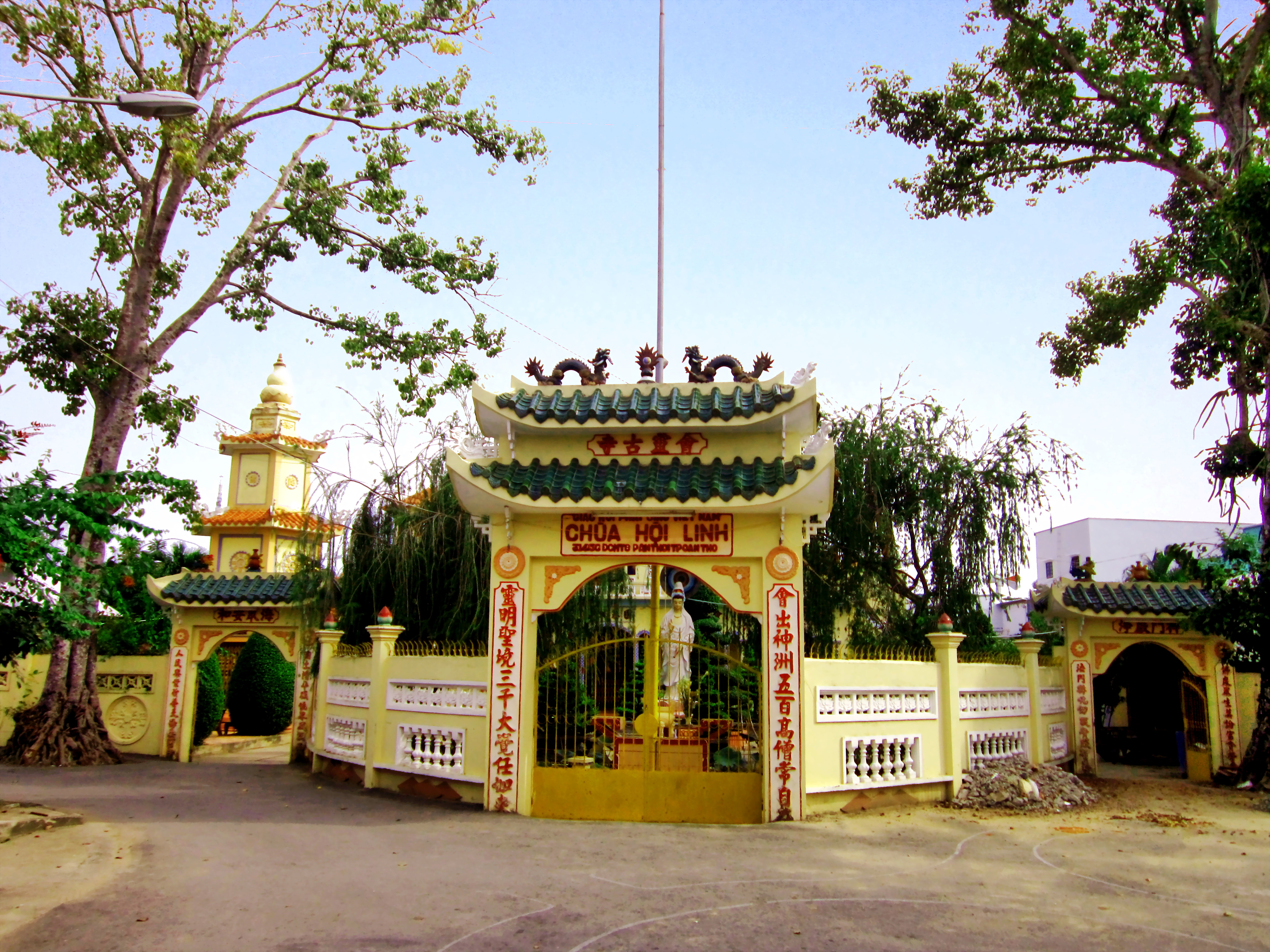 Chùa Hội Linh (còn gọi là Hội Linh Cổ Tự) xây dựng năm 1907; hiện tọa lạc tại số 314/36 đường Cách mạng Tháng Tám, phường Bùi Hữu Nghĩa, quận Bình Thủy, thành phố Cần Thơ, Việt Nam.